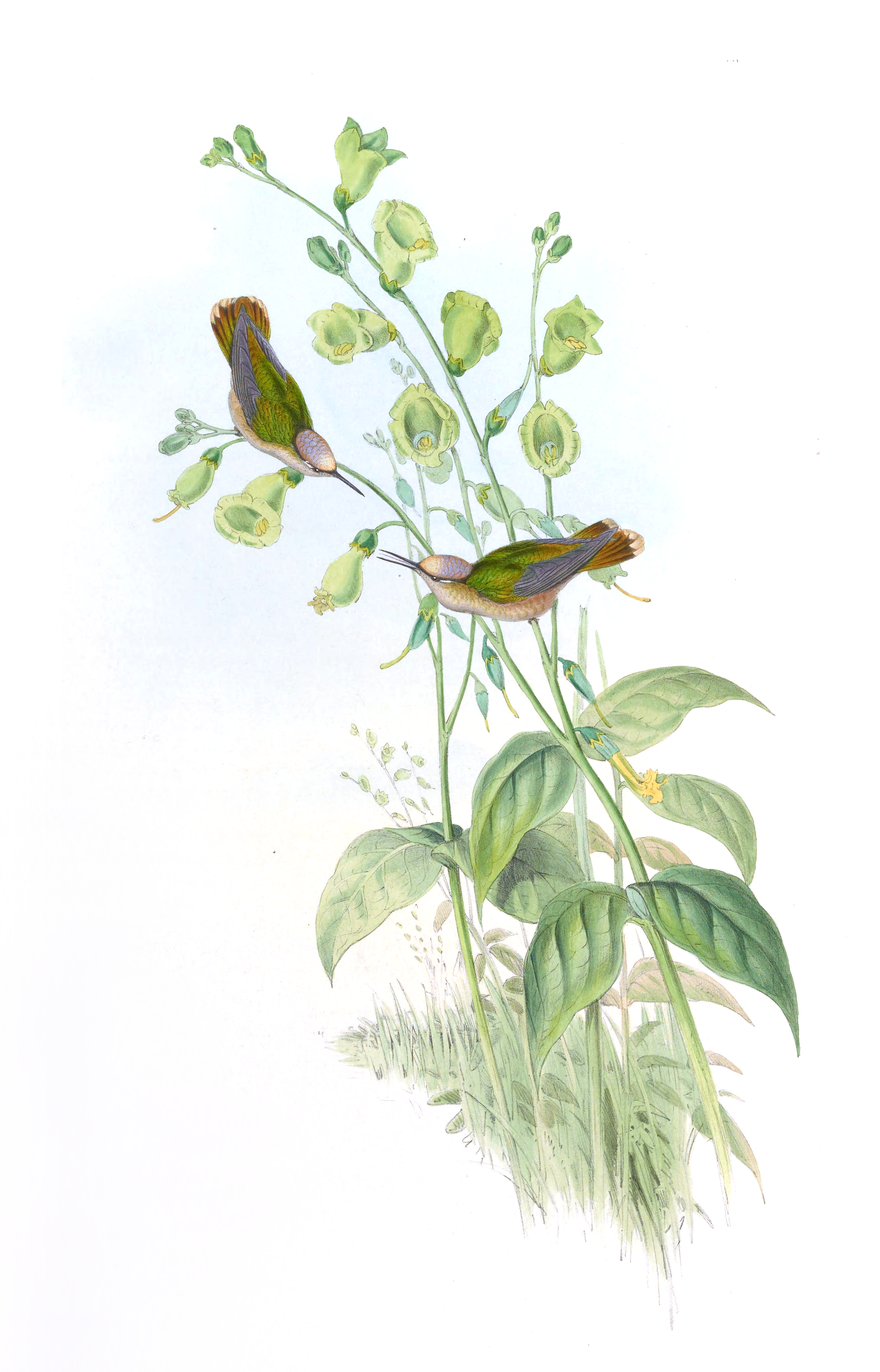 Anthocephala floriceps = Syn: Adelomyia floriceps in John Gould's Hummingbirds ISBN 978-1555216610